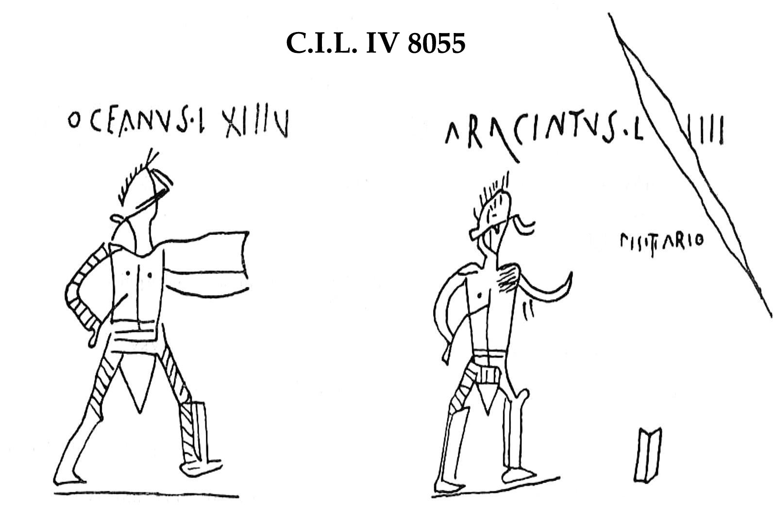 Inscripción pompeyana